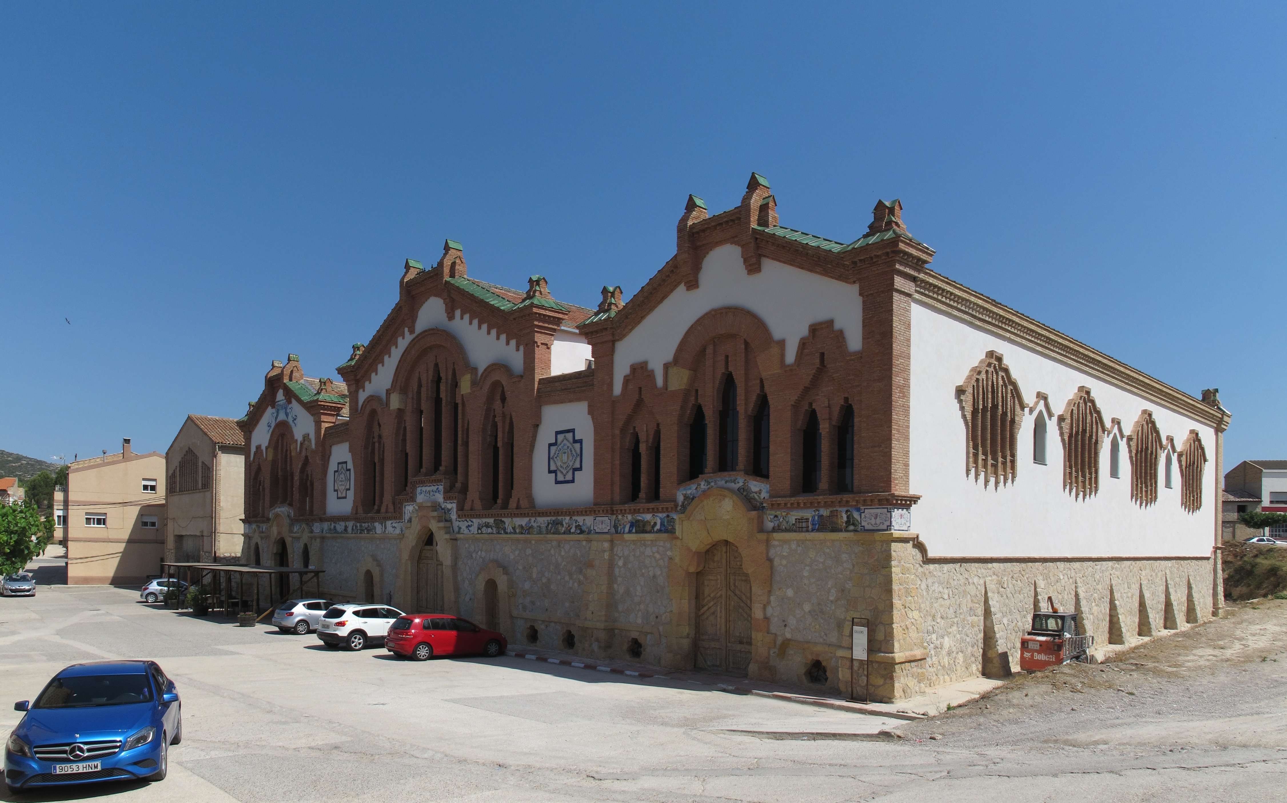 El Pinell de Brai (Katalonien, Spanien): Celler Cooperatiu (Weinkellerei der Genossenschaft), Vorderseite